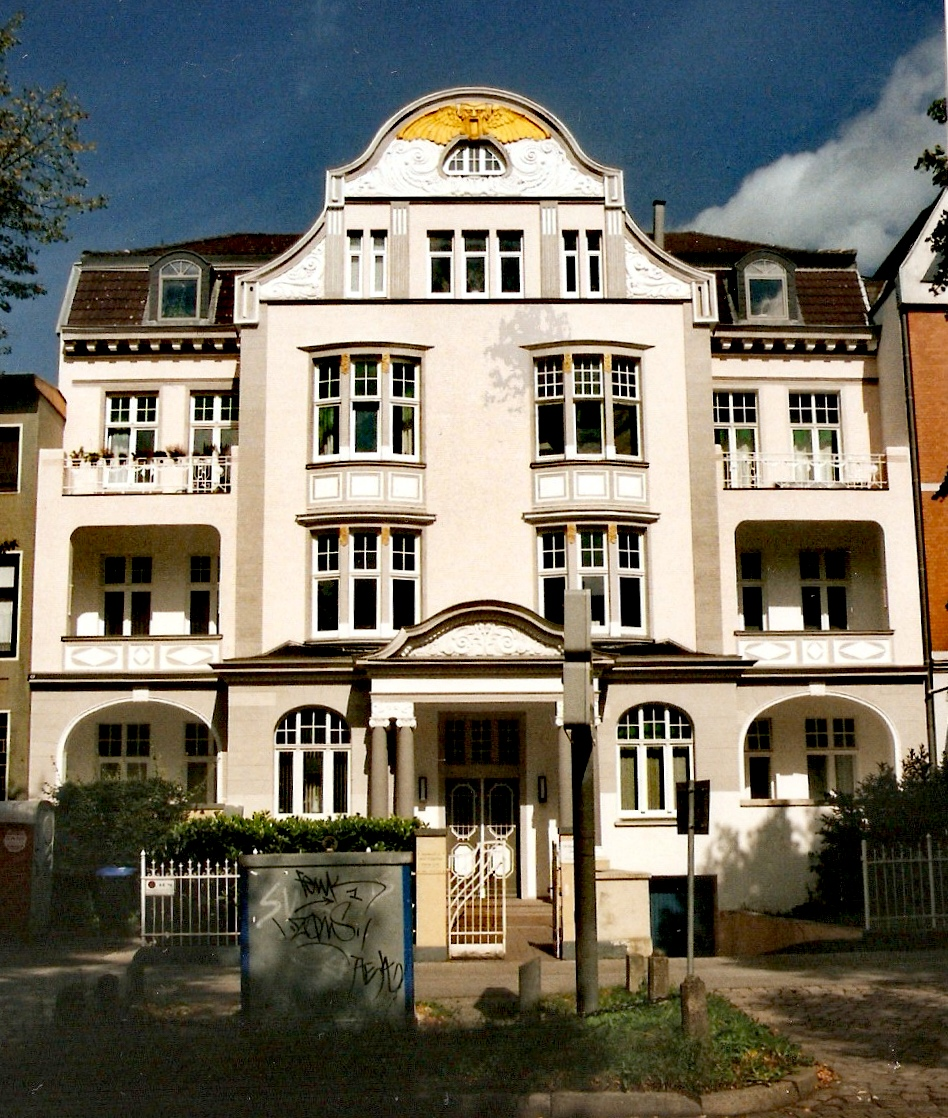 Alterswohnsitz von Hans v. Kleist, Moltkestraße 1a